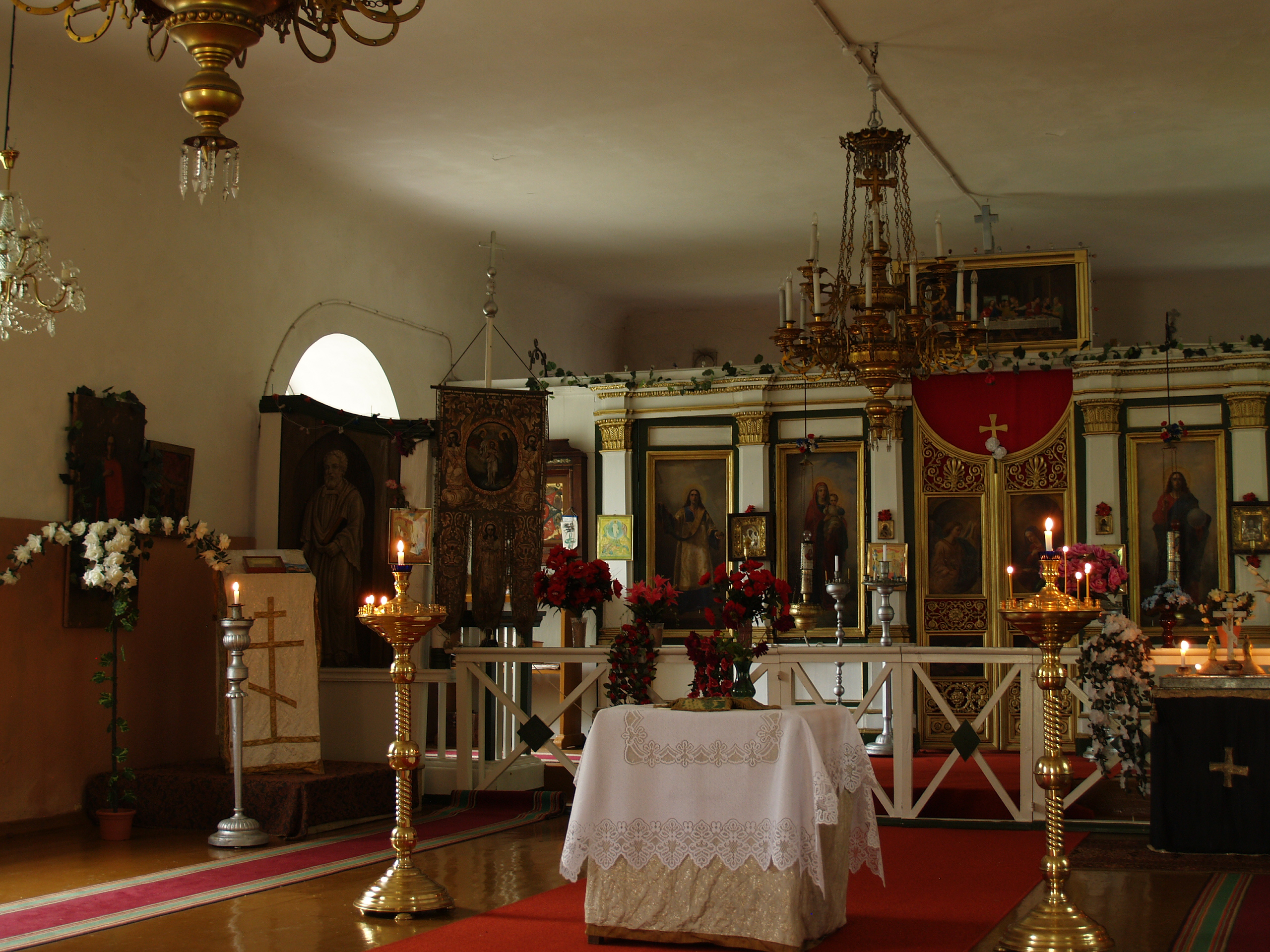 Kihnu Püha Nikolai kirik, interjöör.